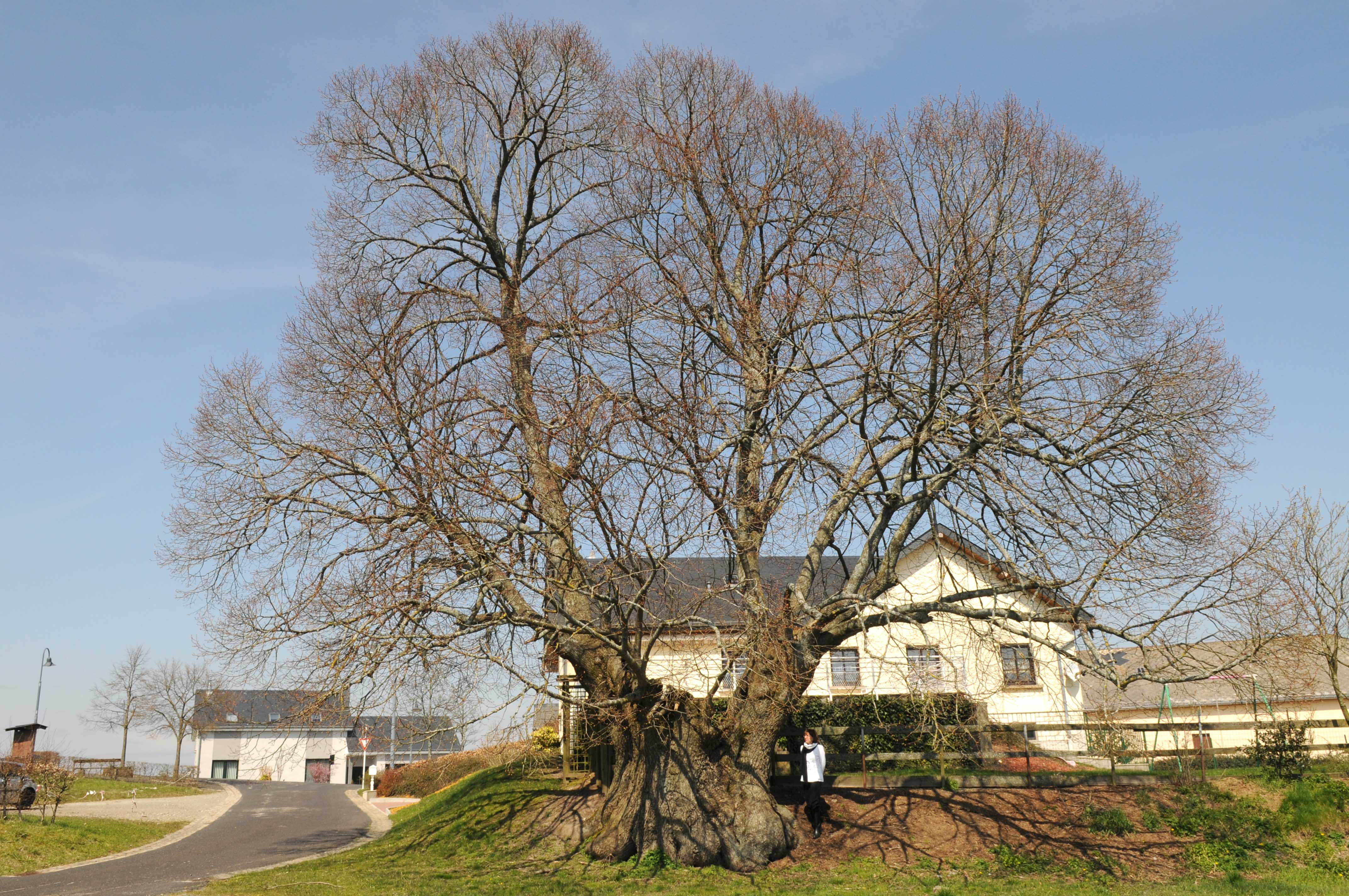 Lann zu Pëtscht.